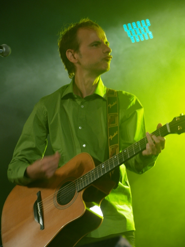 Lluís Gavaldà, cantant d'Els Pets, a l'Acústica 2009